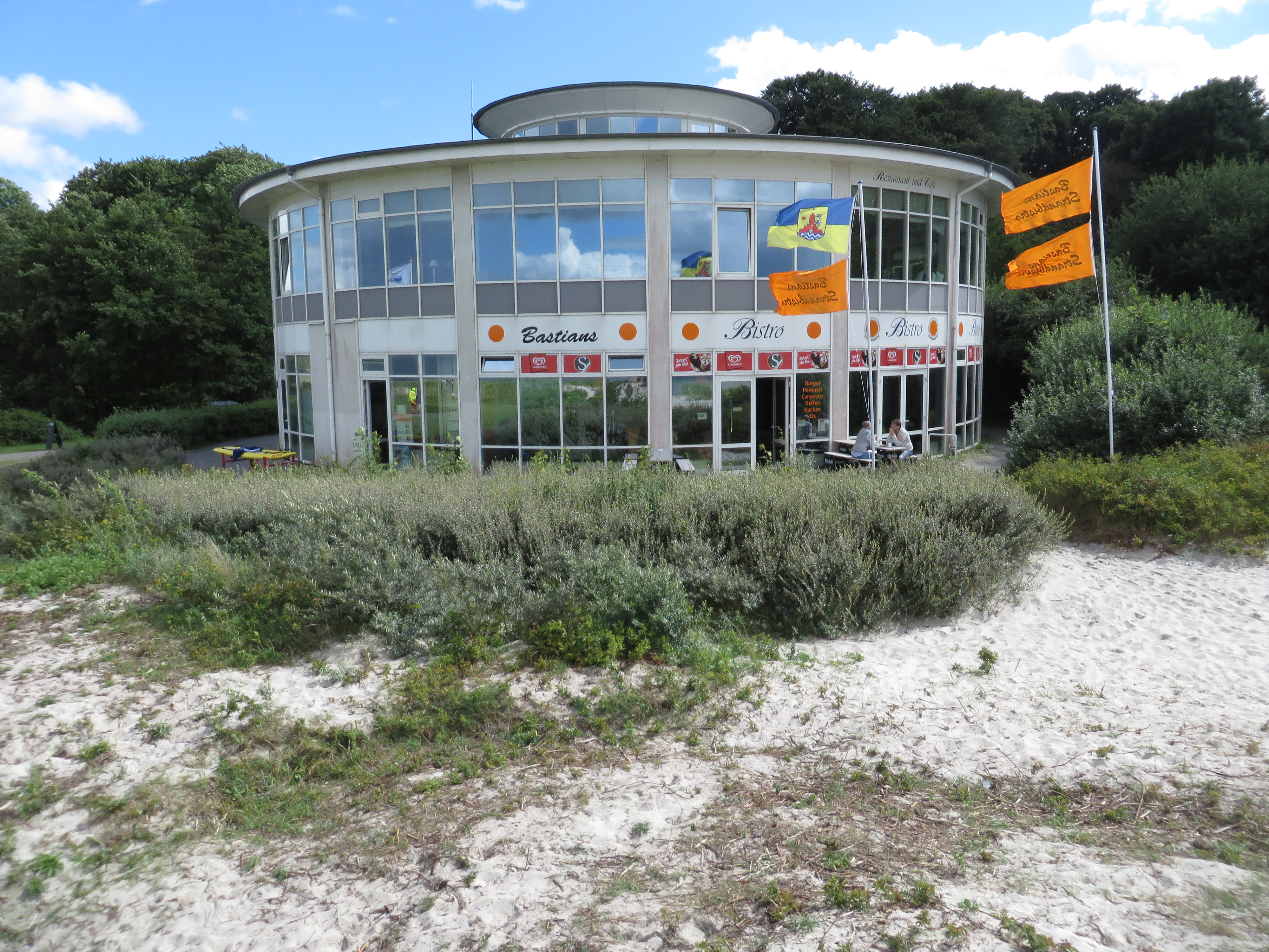 Solitüde-Pavillon (Flensburg-Mürwik 6 August 2016), Bild 01